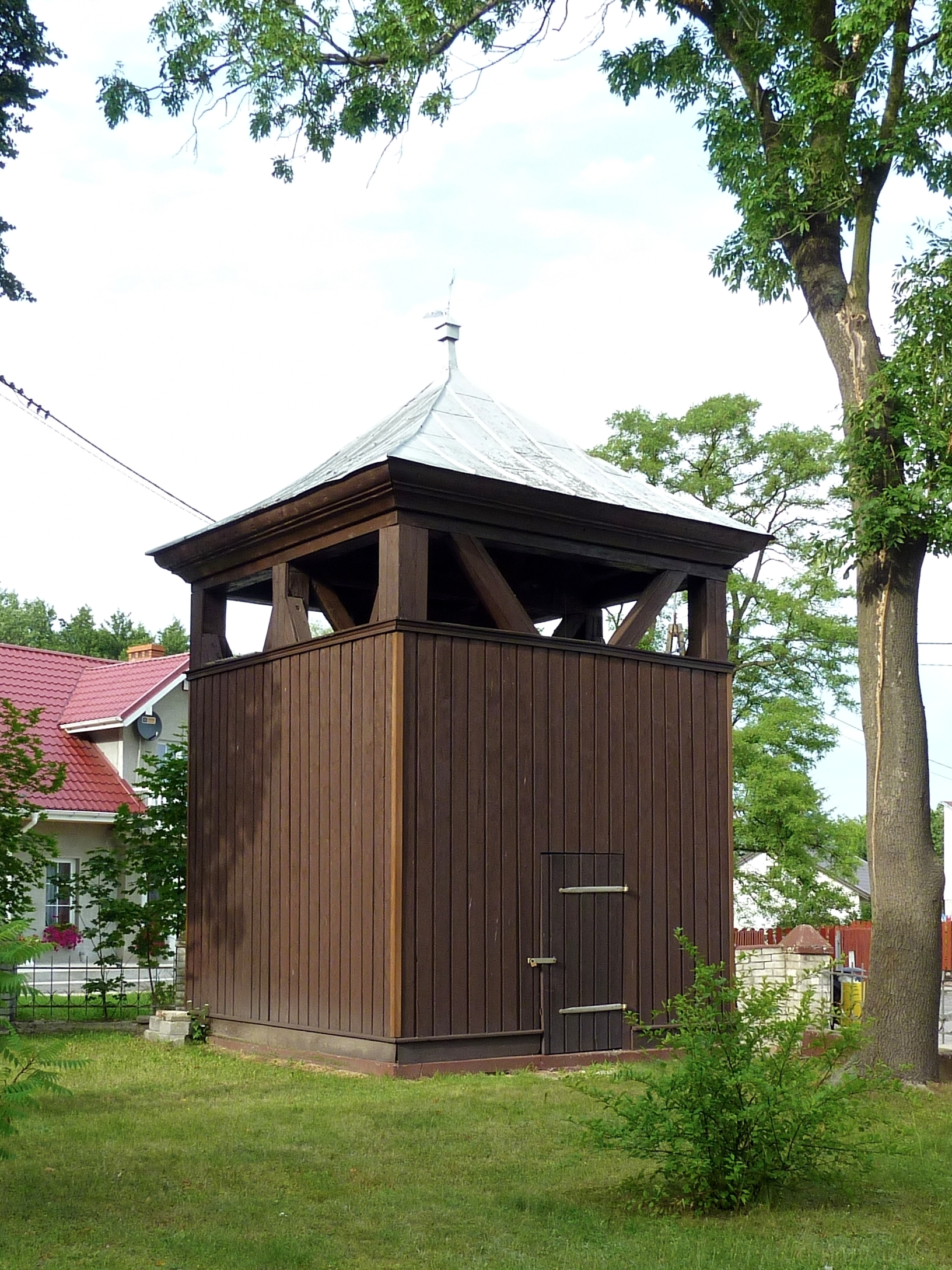 Dzwonnica kościoła św. Aleksego w Płocku.